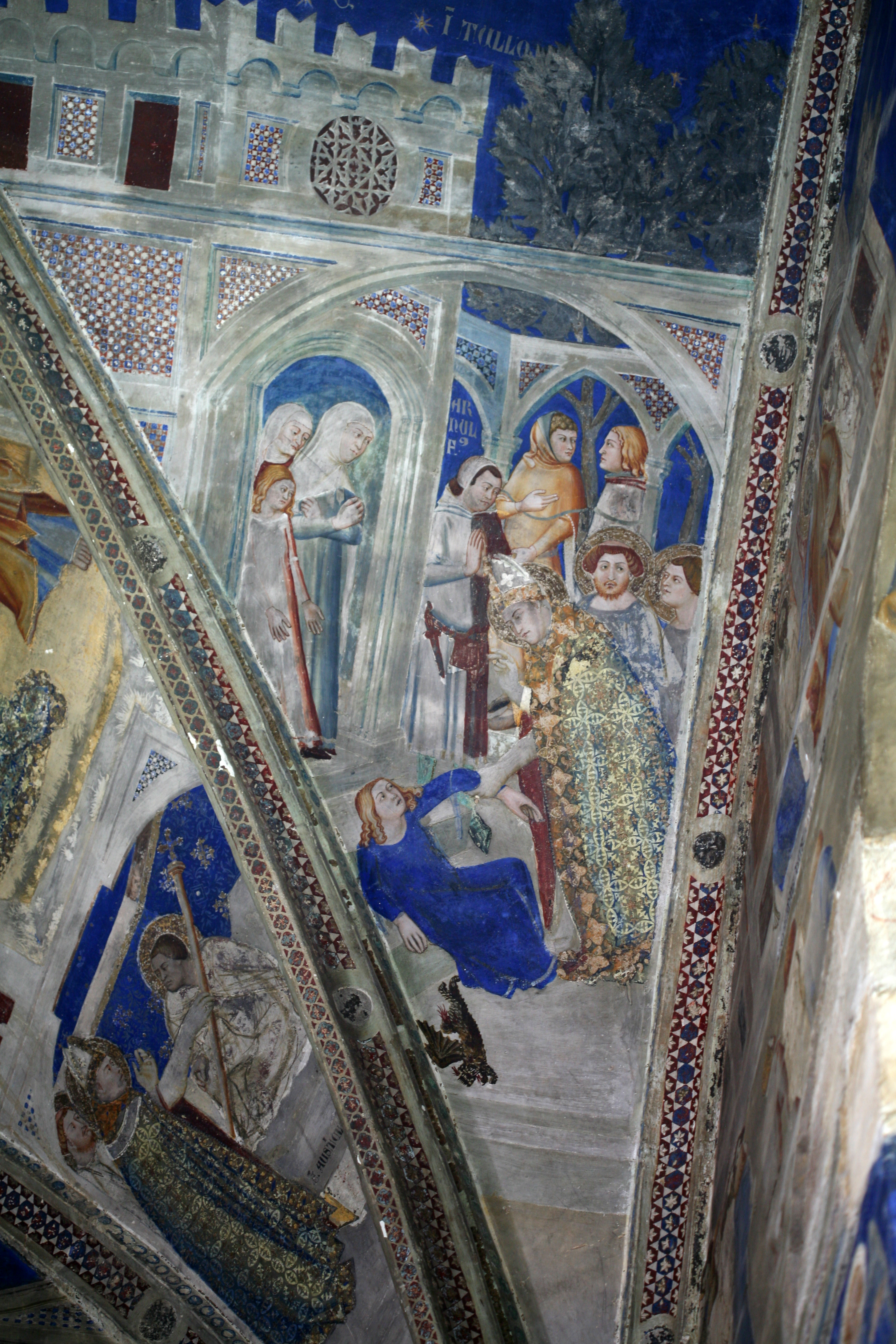 La vie de saint Martial - Guérison de la fille d'Arnulfus - Voûtain sud. Chapelle de saint Martial, Palais des Papes, Avignon, Vaucluse, France.